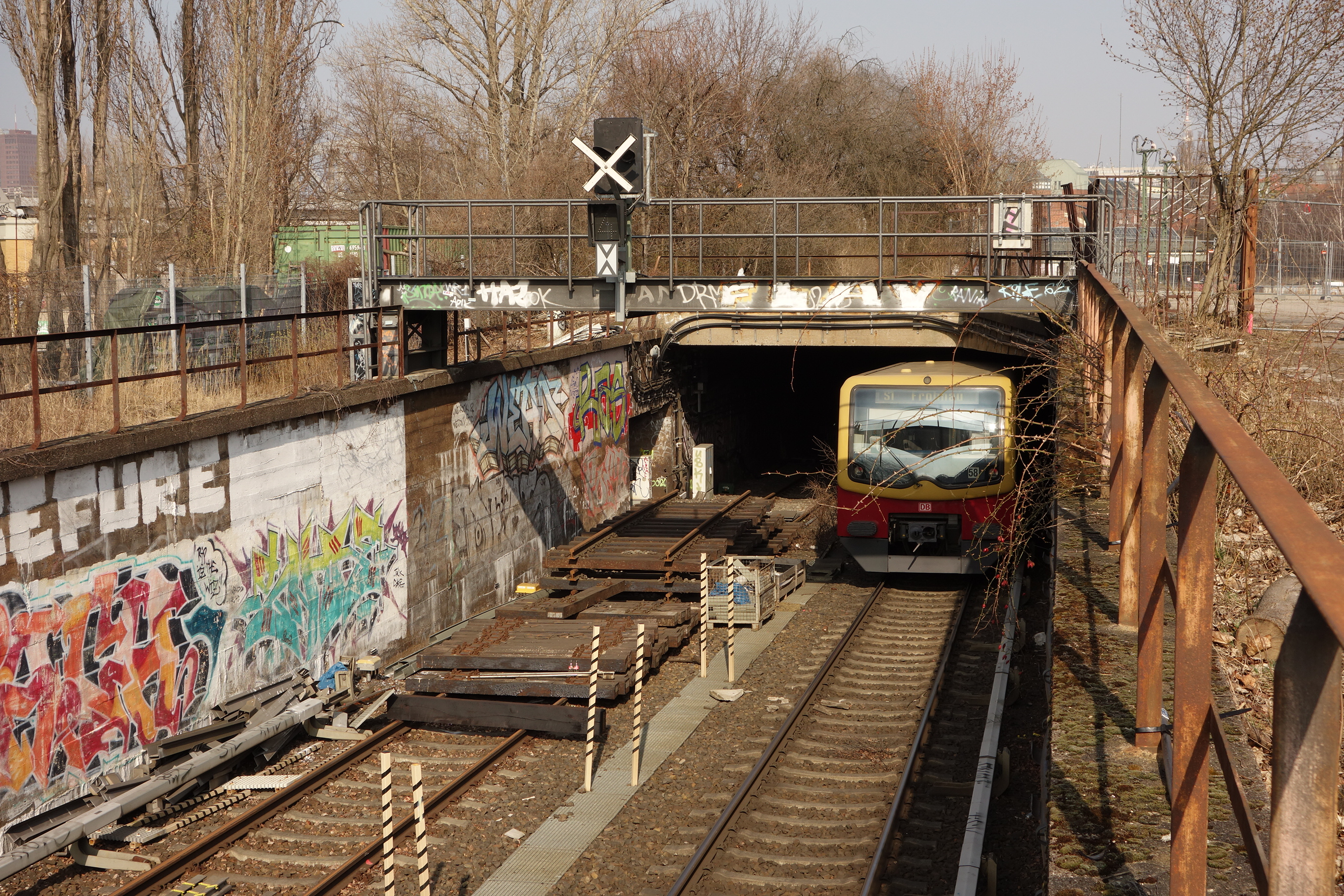 Nord-Süd-Tunnel der S-Bahn Berlin, Portal Süd (S1)